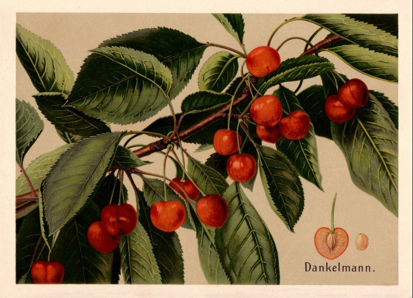 Stuttgart 1905-1930, Loseblattsammlung mit 36 chromolithographischen Tafeln sowie zugehöriger Landschaftsphotographie und Textblättern.